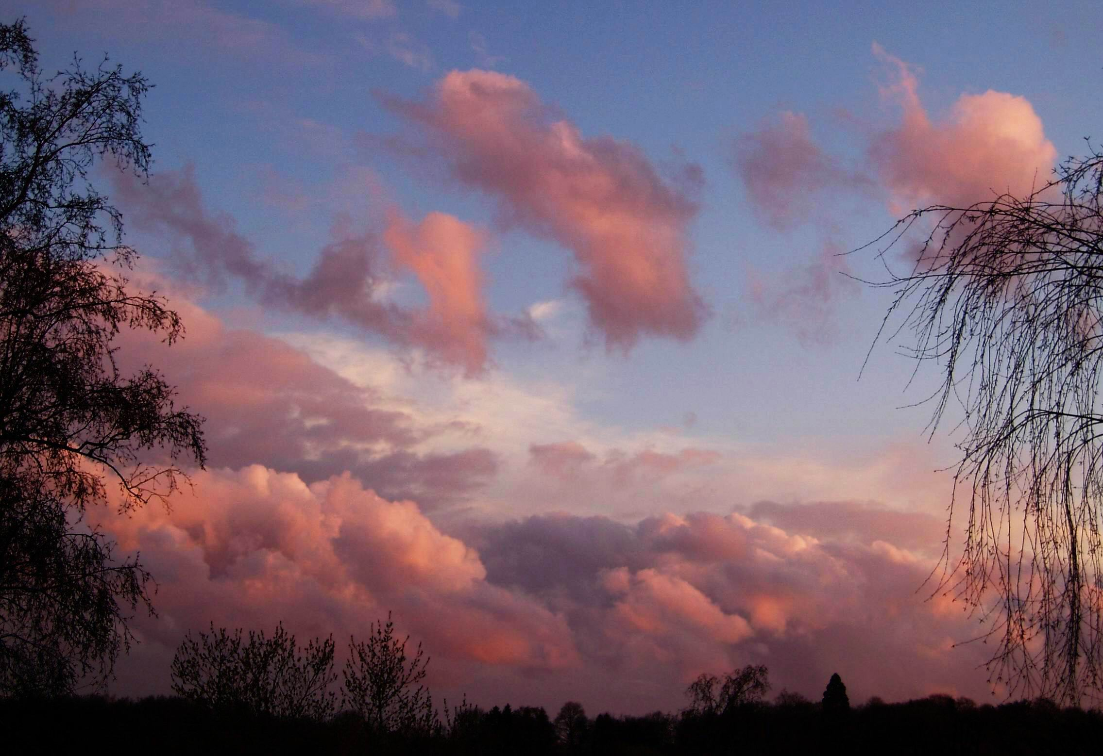 Nuages roses